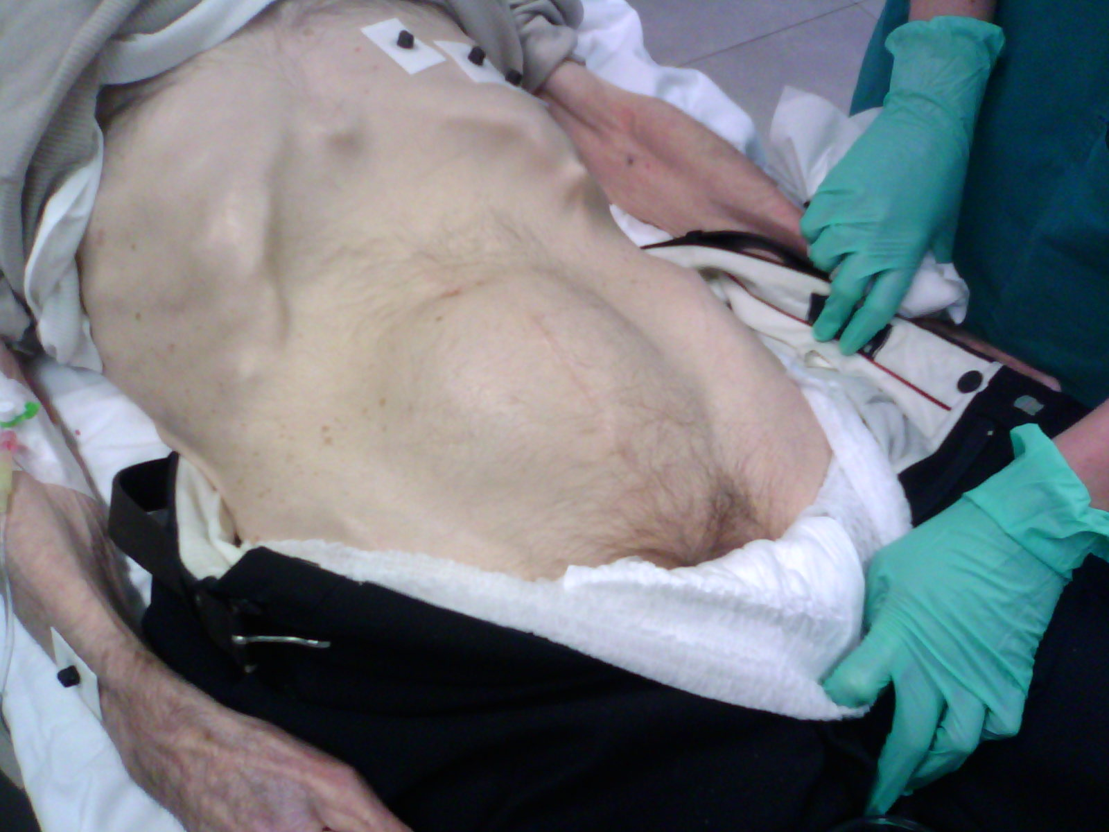 Paziente grande anziano, magro, affetto da globo vescicale (dopo cateterismo con Foley 16F ristagno vescicale 2000cc)